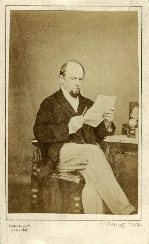 Photograph by Henry Hering